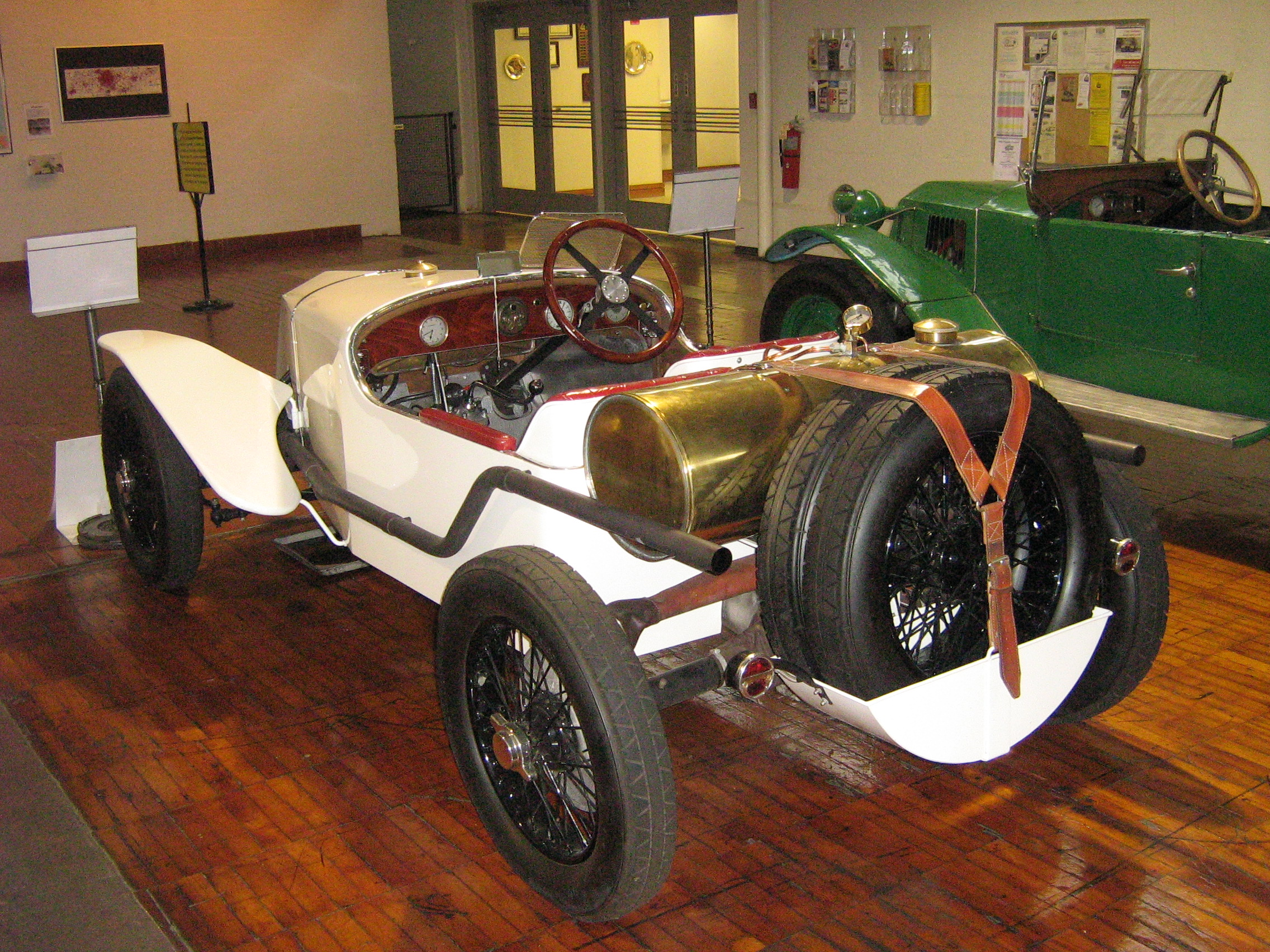 1925 Tatra T-12 Targa Florio Replica